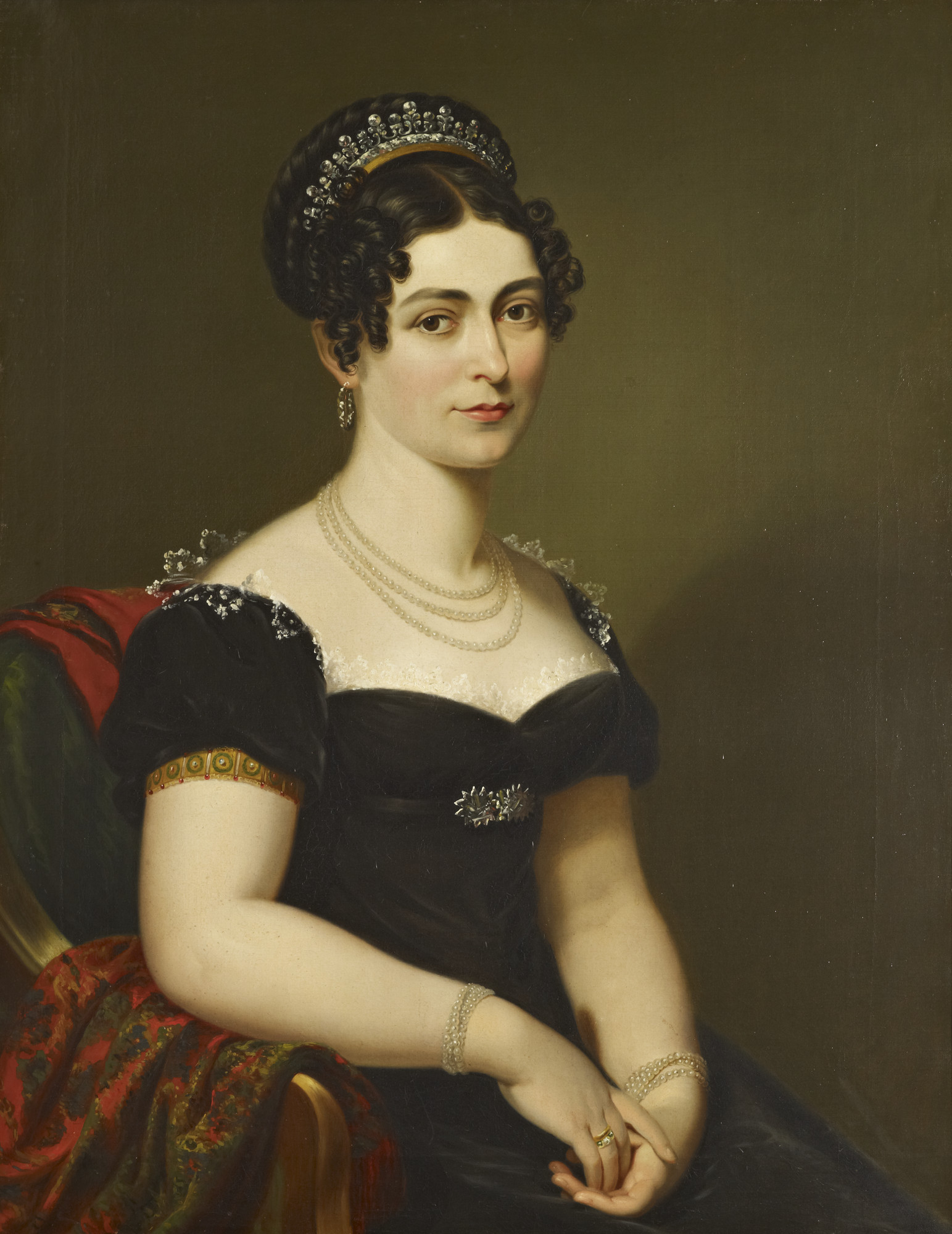 Buste van de hertogin van Kent